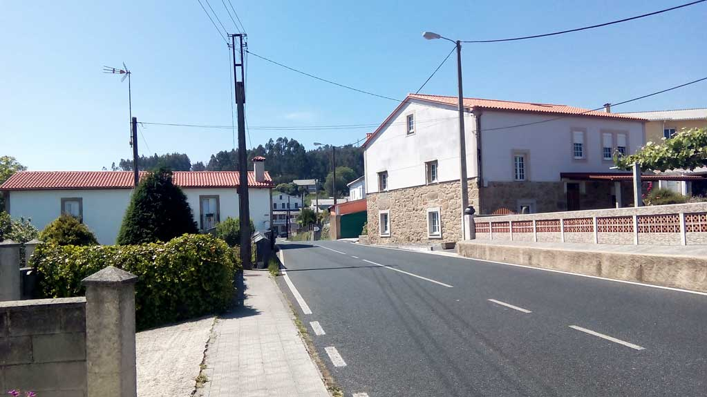 Vista de Valón Vello en DP3608.